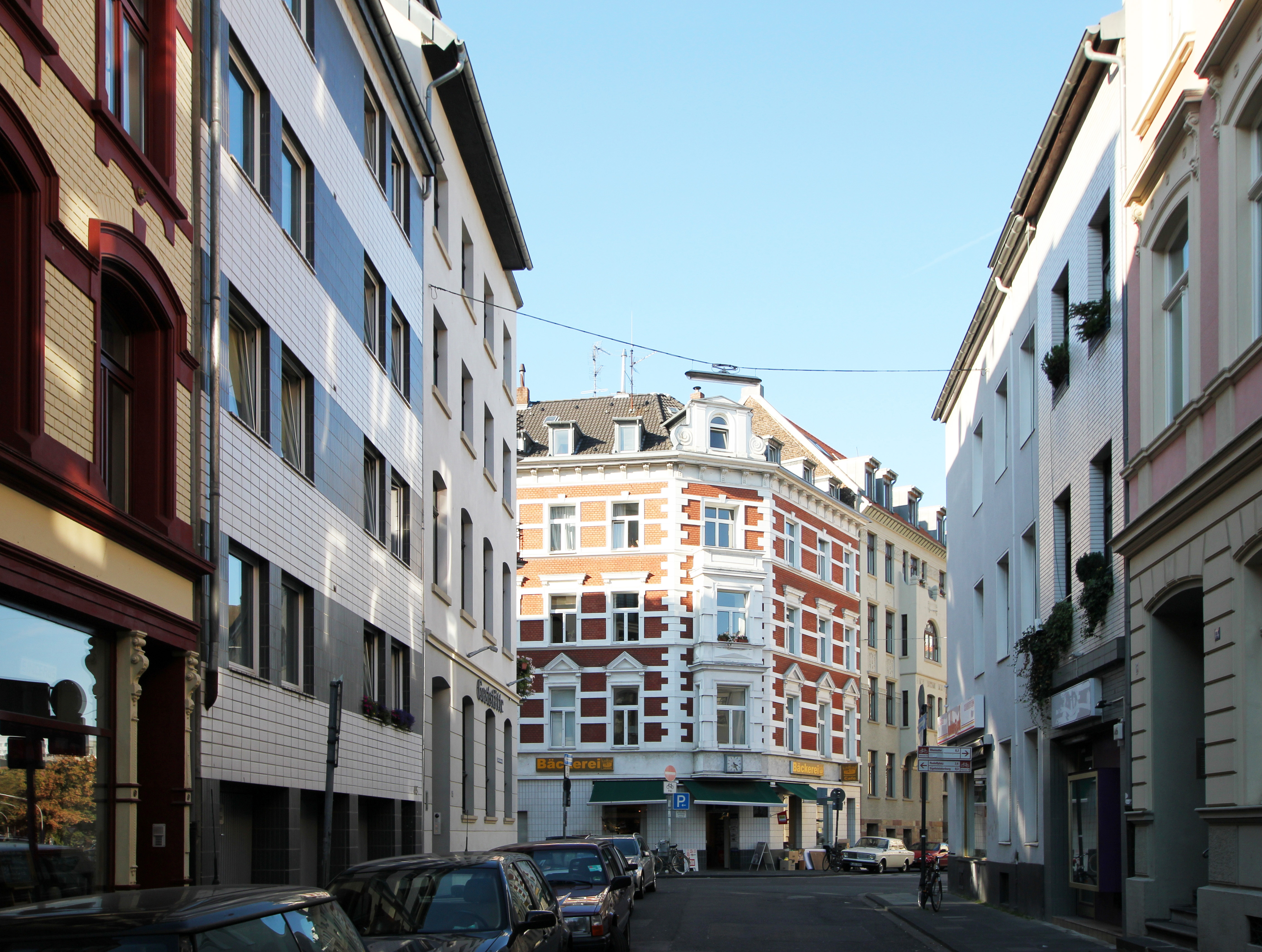 Köln Altstadt-Nord, Unter Kahlenhausen / Türmchenswall